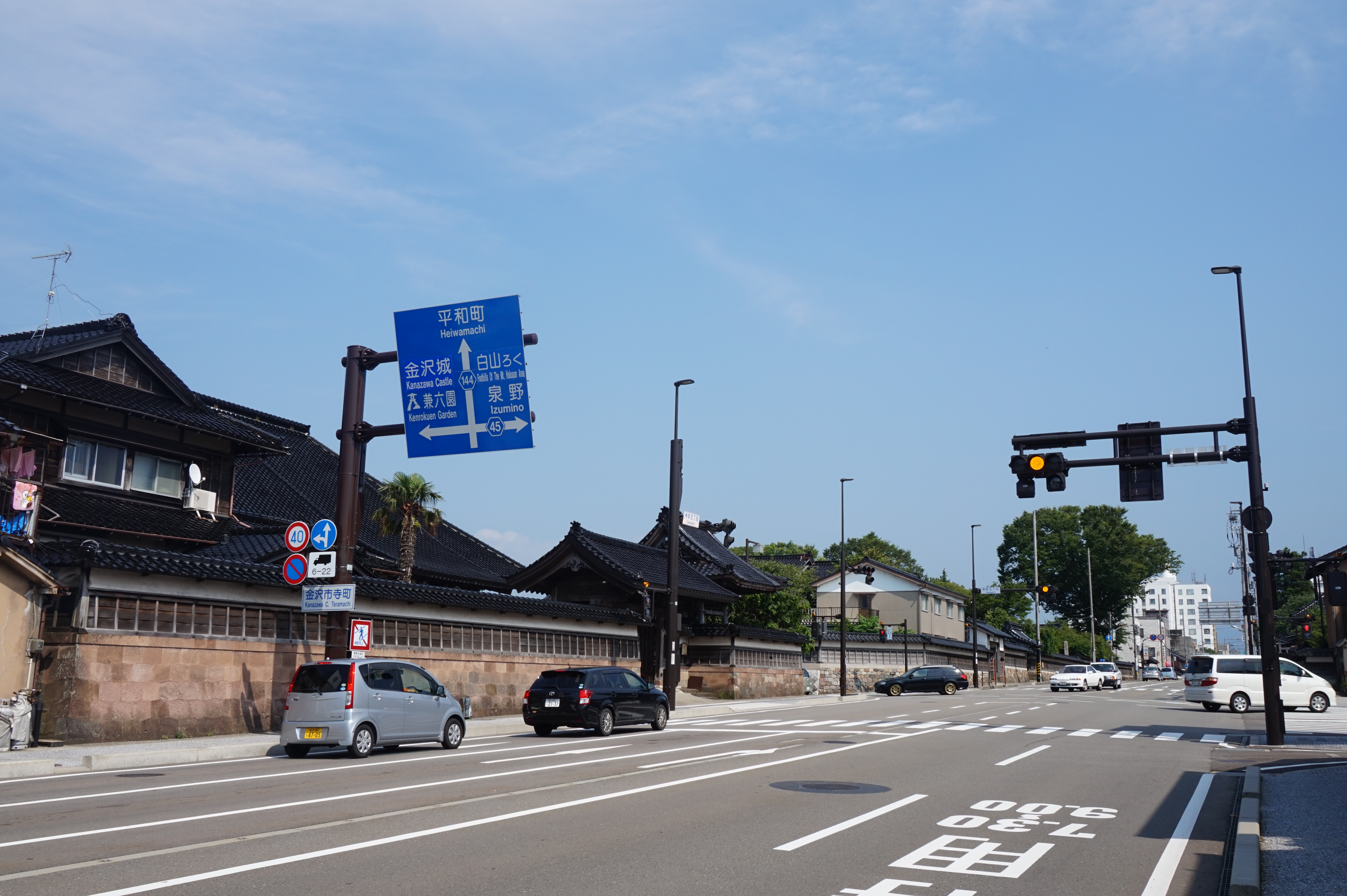 金沢市寺町台地区（寺町）の旧野田道。妙典寺前。